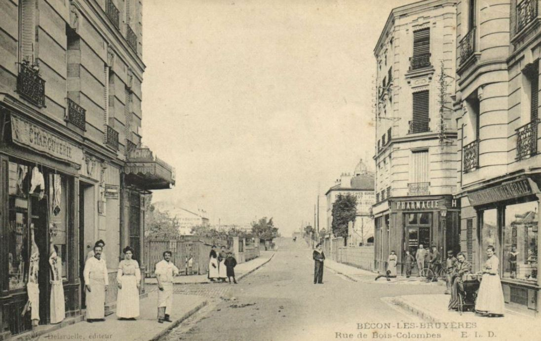 Asnières.Bécon-les-Bruyères.Rue de Bois-Colombes